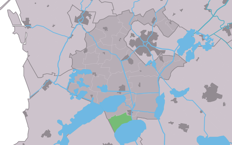 Kaartsje fan himrik fan Ypekolsgea